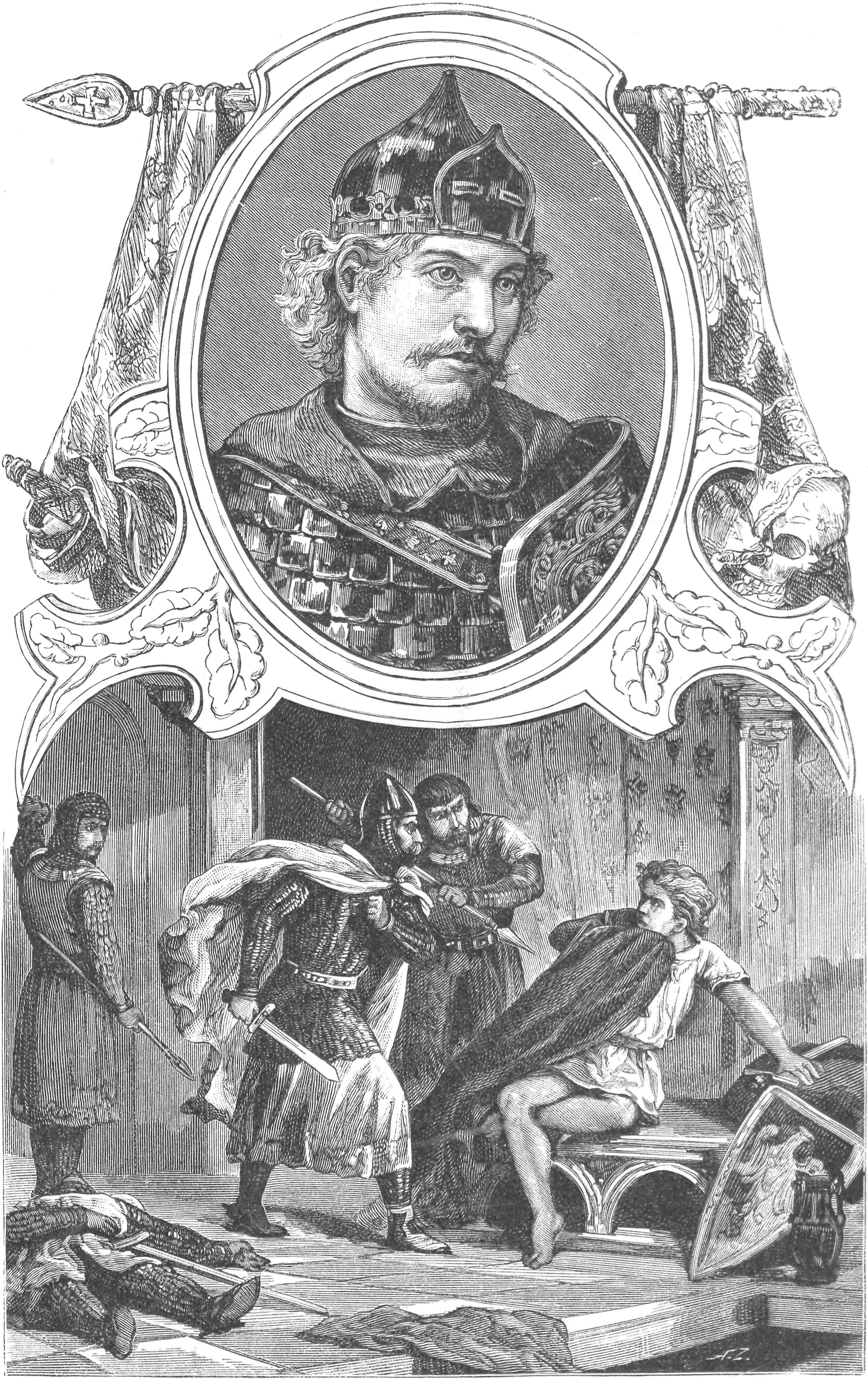 ilustracja z książki „Wizerunki książąt i królów polskich“